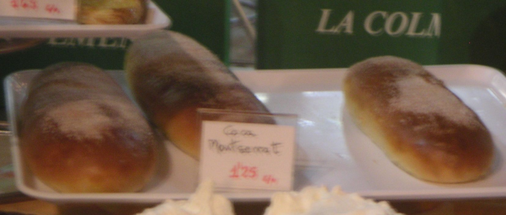 Montserratines en un aparador de Barcelona.